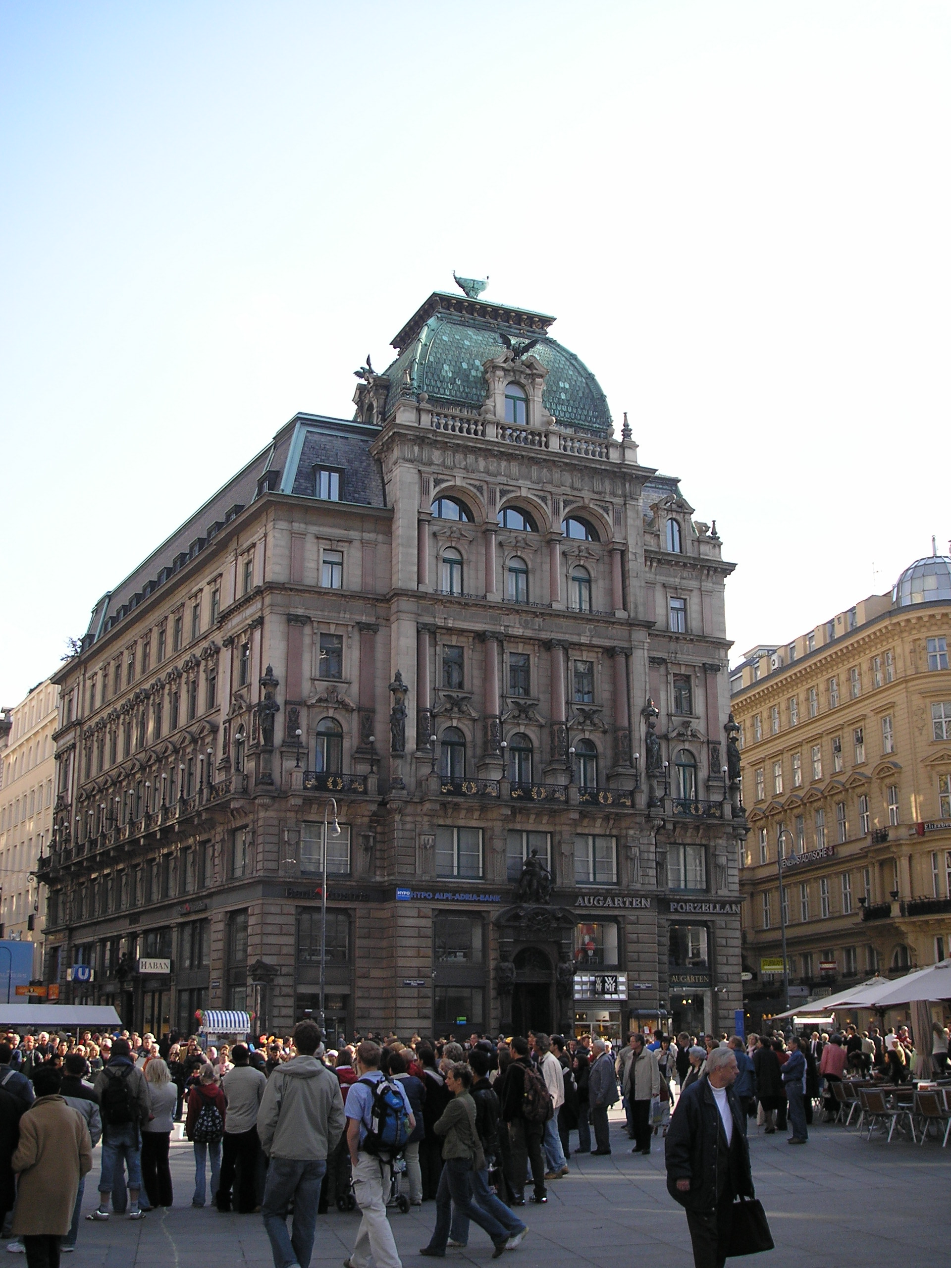 The Palais Equitable in Vienna, at Graben and Kärntner Straße. Address is Stock-im-Eisen-Platz.